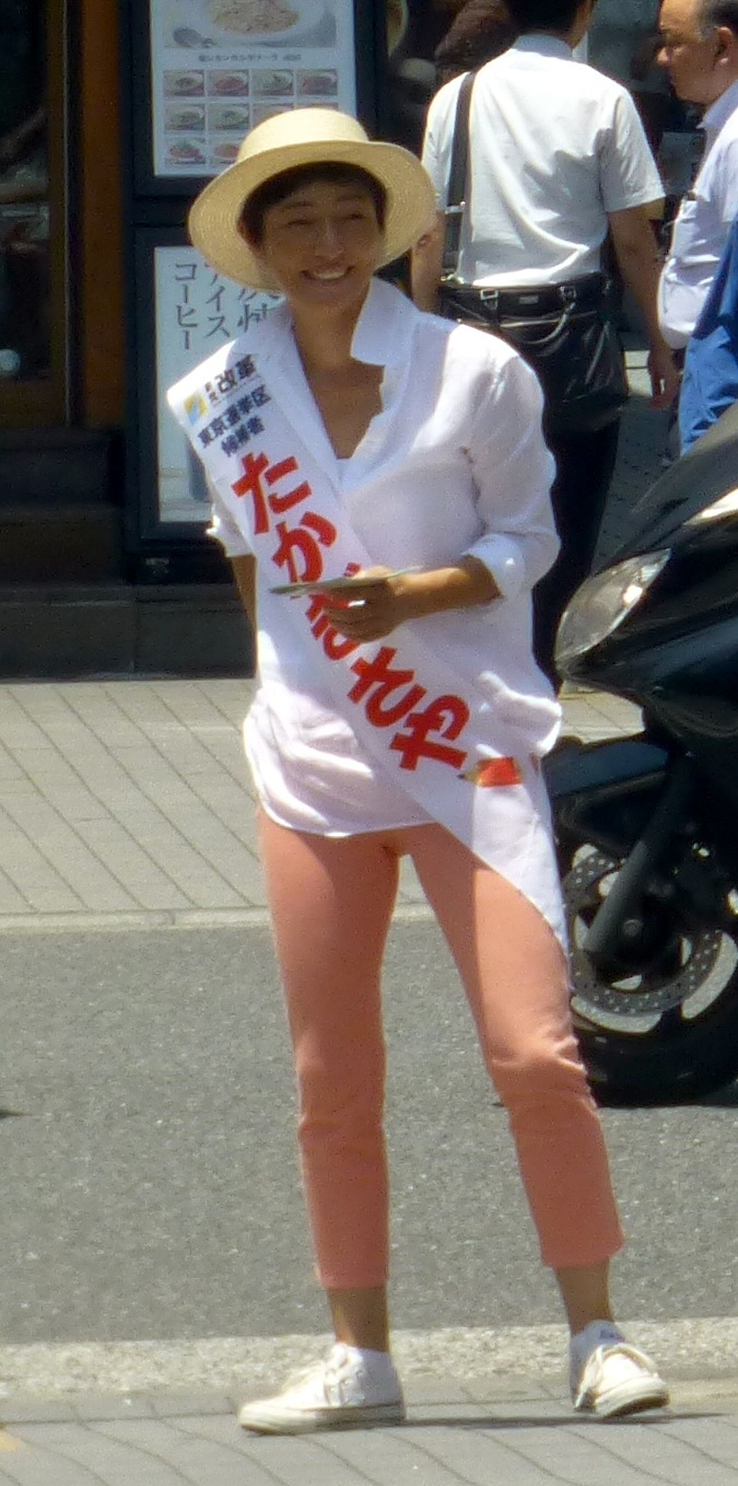 益戸 育江（ますど いくえ、 Ikue Masudo、1963年8月21日 - ）は、日本の女優、作詞家。旧芸名は高樹 沙耶（たかぎ さや、Saya Takagi）。